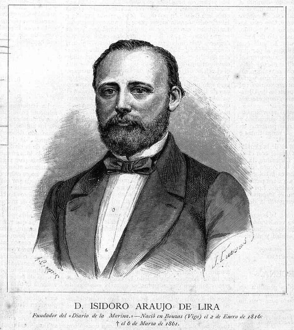 Retrato de Isidoro Araujo de Lira, publicado en la revista española La Ilustración de Galicia y Asturias.